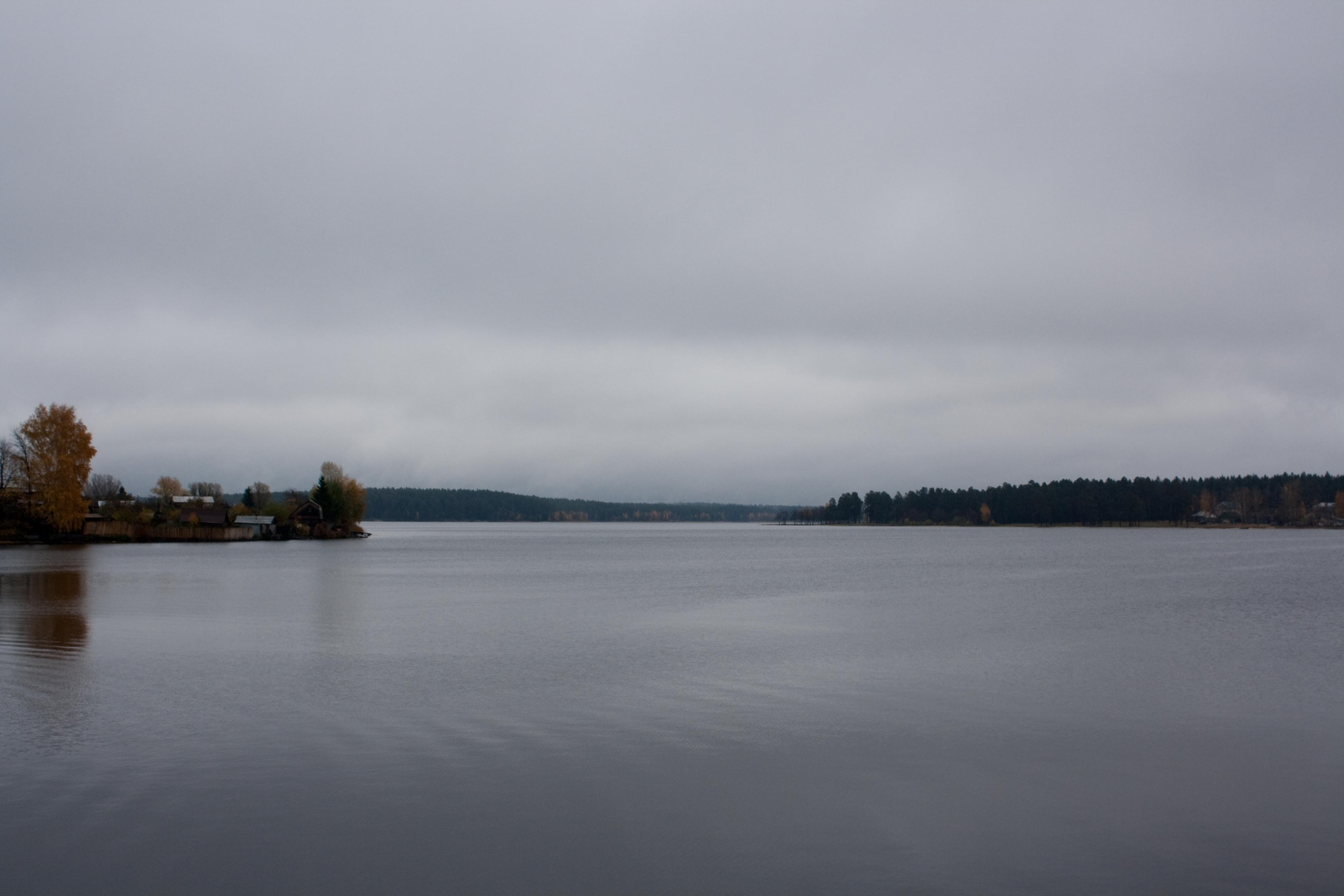 Vyksa, Nizhny Novgorod Oblast, Russia